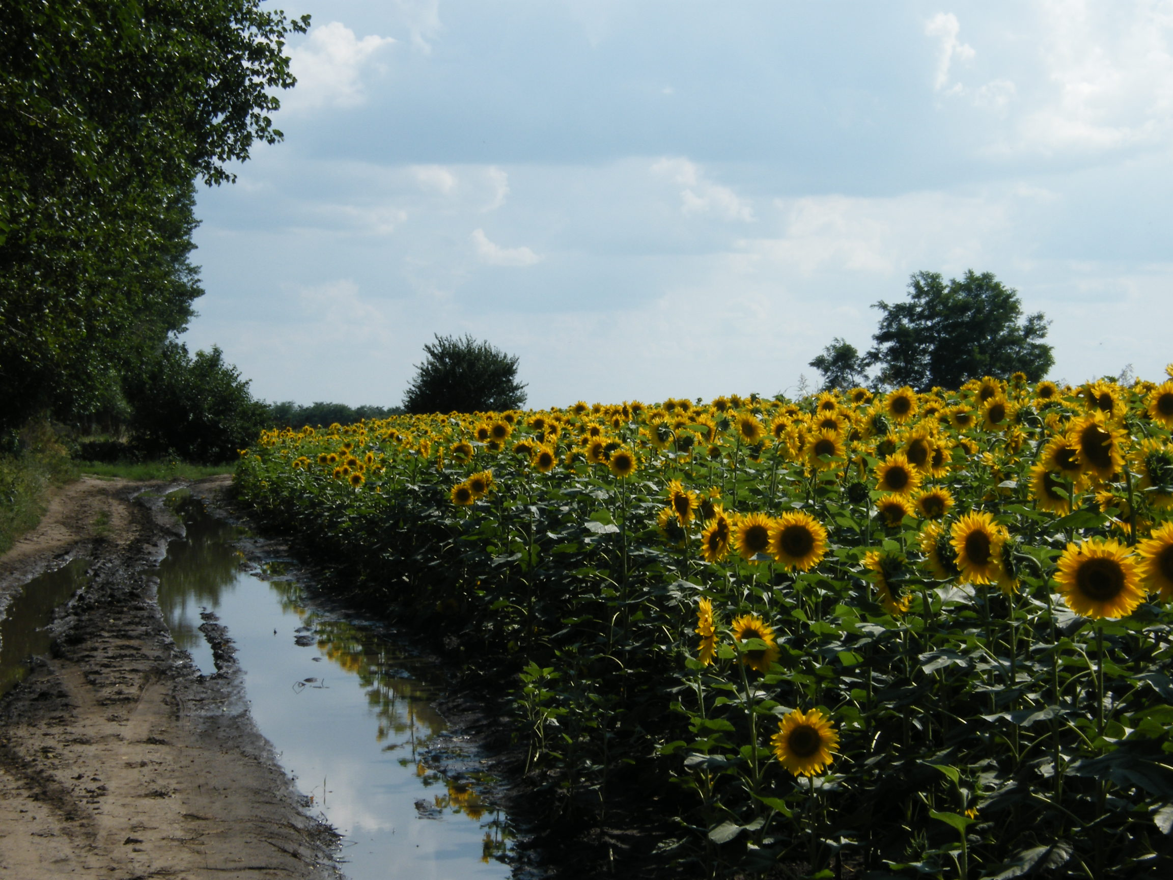 Autor - Măcreanu Iulian Descriere - Fotografia ilustrează modul de practicare a agriculturii la începutul secolului XXI în comuna Bordei Verde Restricţii - Fişierul poate fi folosit fără nici o restricţie